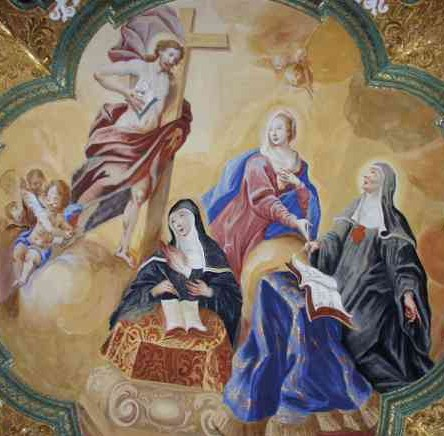 Mechthild von Magdeburg (von Helfta) (Mitte unten) und Gertrud von Helfta (Gertrud die Große), Deckenfresko, um 1720, in der Bibliothek des Klosters Metten.